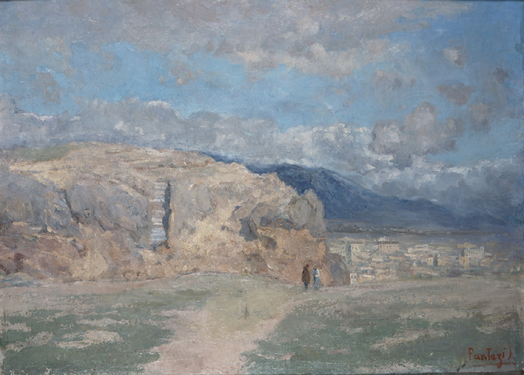 Greek painter Périclès Pantazis (1849–1884):Areopagus